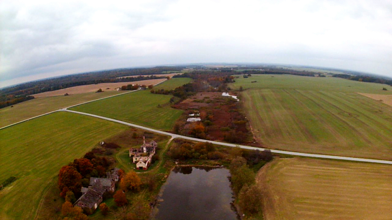 Sügis Jõeperes